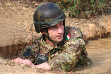 Galantino durante il suo lavoro da militare